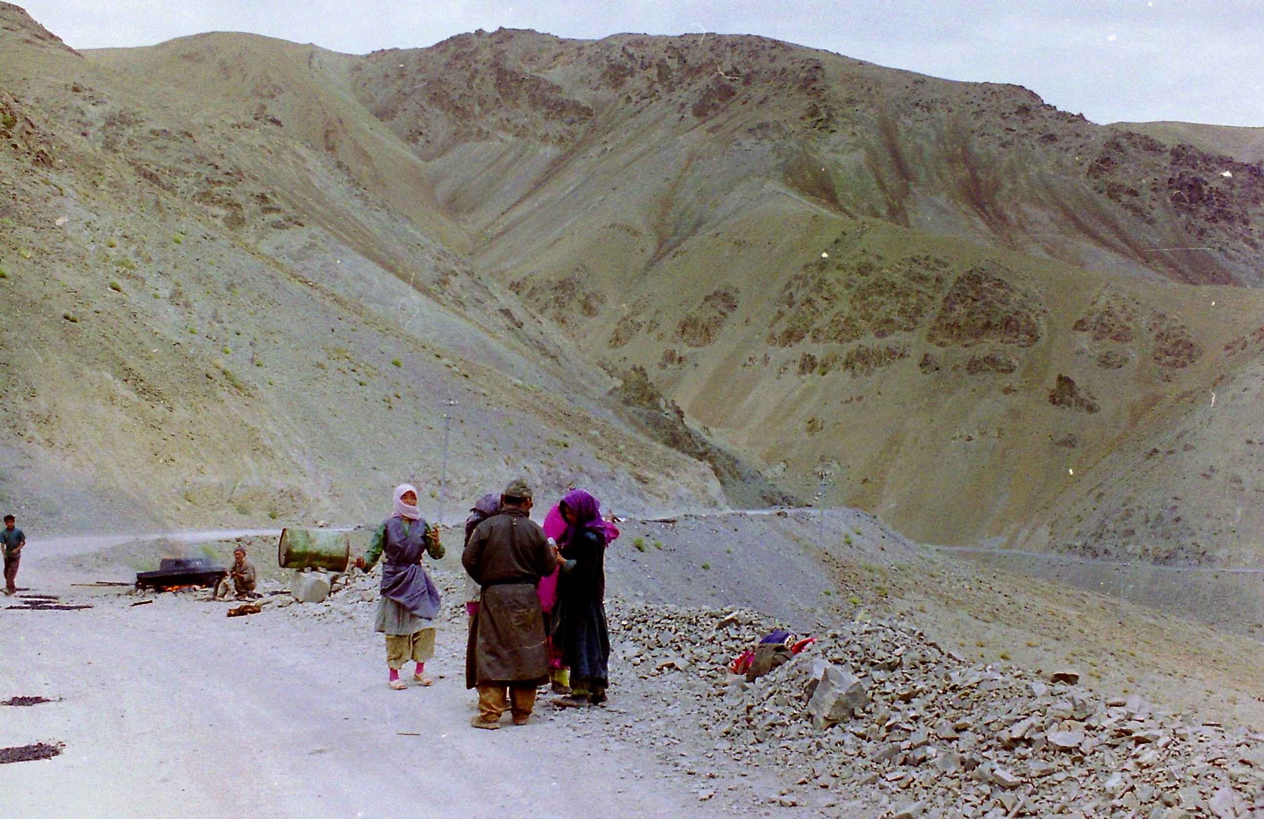 “Project l’Himank” panneau de la sécurité routière au Ladakh ( scan d'une photo prise lors d'un voyage en 1995